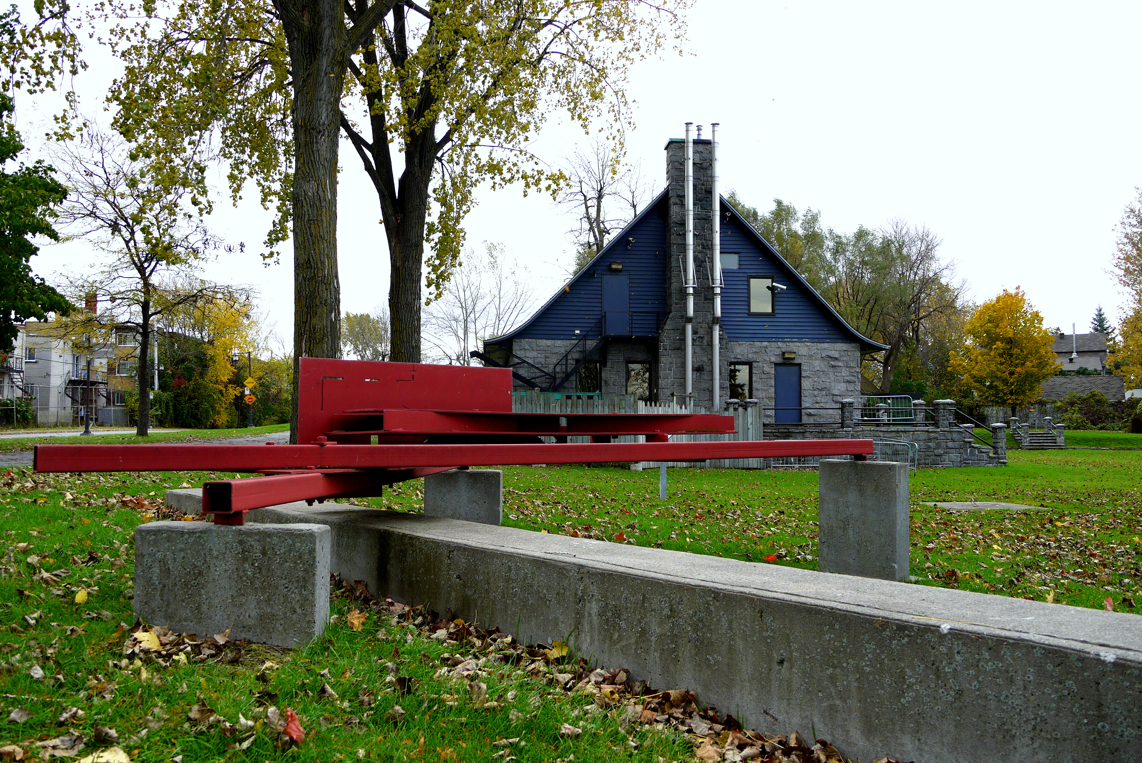 Musée plein-air de Lachine. Avec les œuvres «Bow and Lever» et «Jack», «Dex» fait partie d'une série de sculptures de très grand format réalisées à la fin des années 70 sur le vaste terrain attenant à l'atelier de l'artiste. Dans cette œuvre, Henry Saxe poursuit l'expérimentation des lois de la physique et de la géométrie. De très grande dimension, cette sculpture s'étale très près du niveau du sol. Conçue à l'extérieur, à même le terrain, les éléments qui la composent ont été assemblés dans un souci de mise en valeur de leur carctéristique spécifique : aspect, configuration, poids.